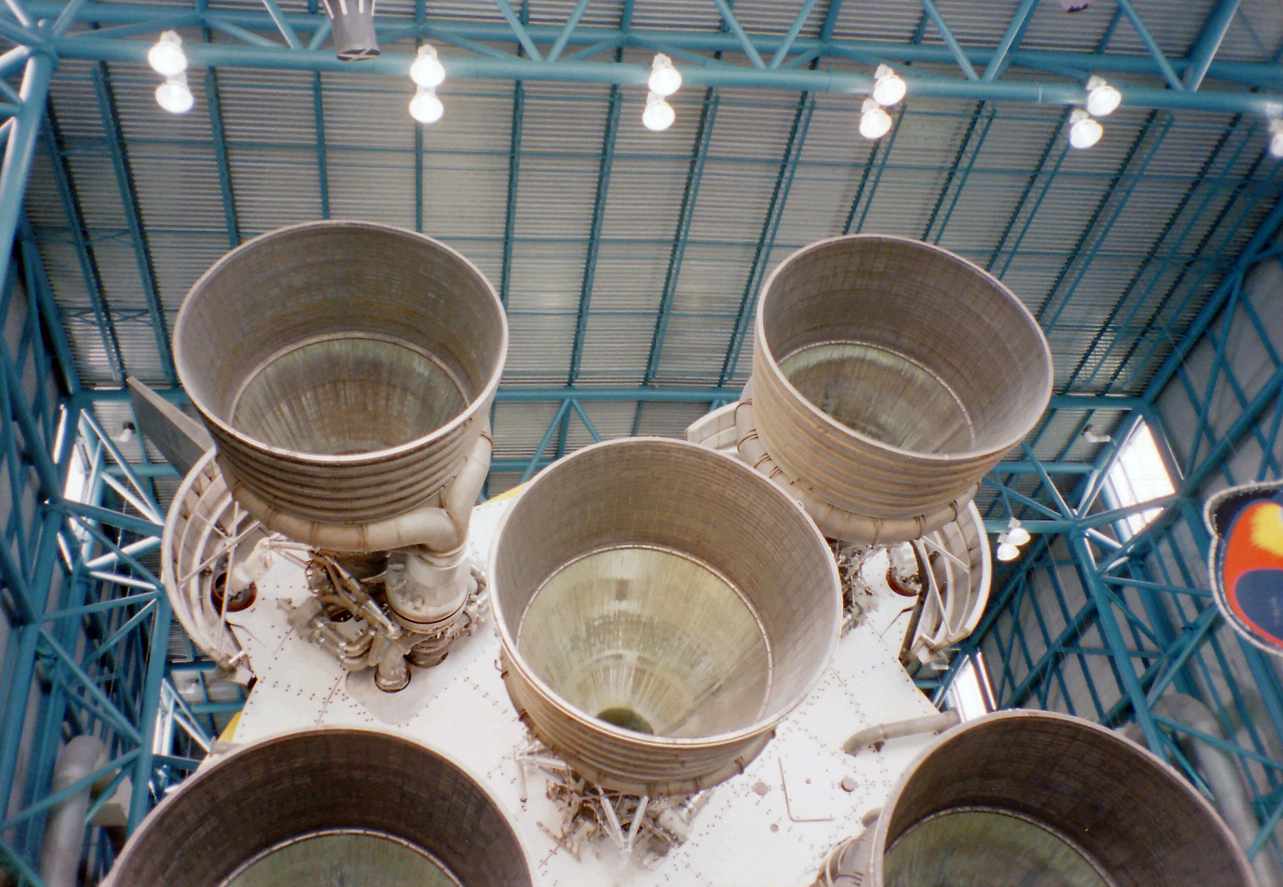 Saturn-V-Rakete, Triebwerk , Lavaldüse